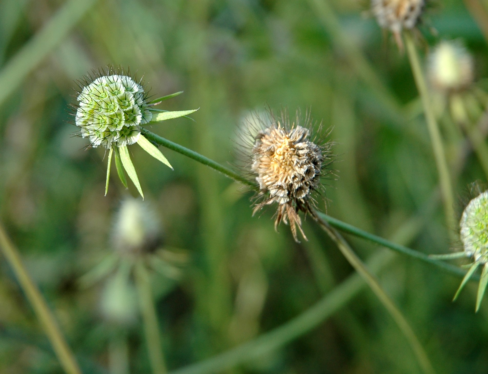 Fruits of Scabiosa columbaria at Jena Botanical Garden, Germany